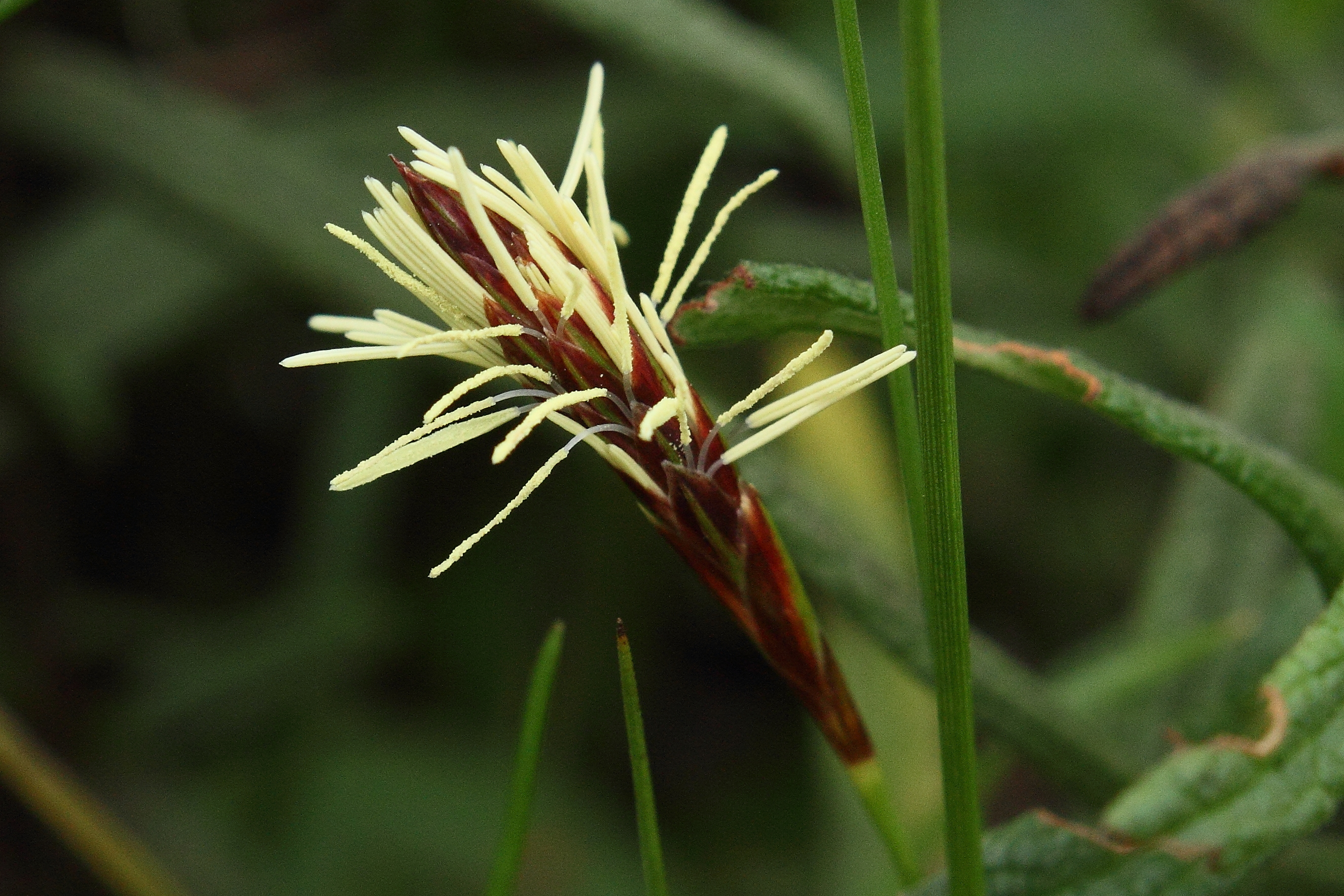 Reino Plantae Filo Magnoliophyta Classe Liliopsida Ordem Poales Família Cyperaceae Género Carex